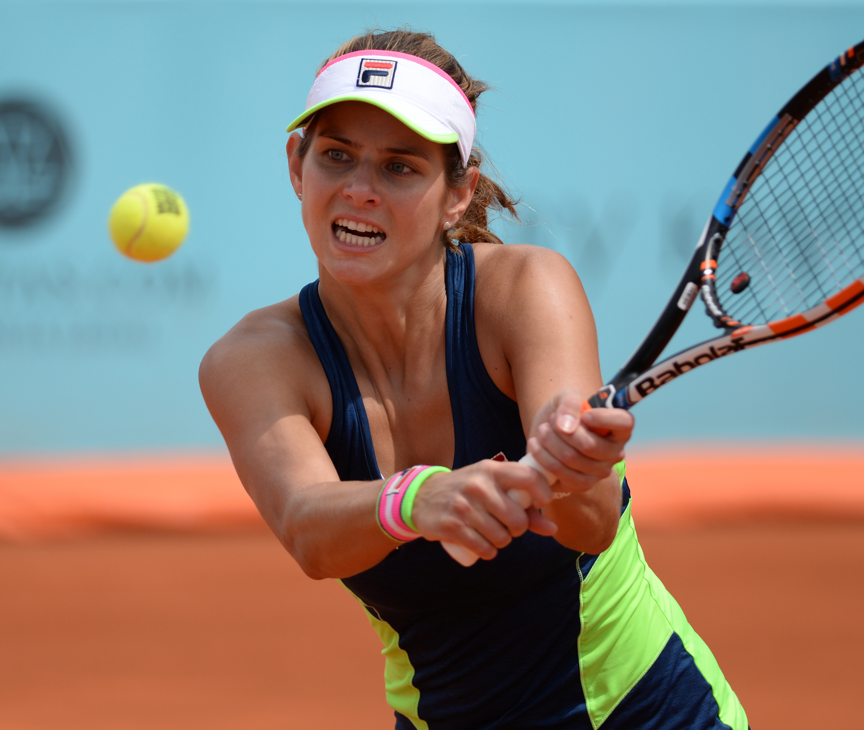 Julia Goerges